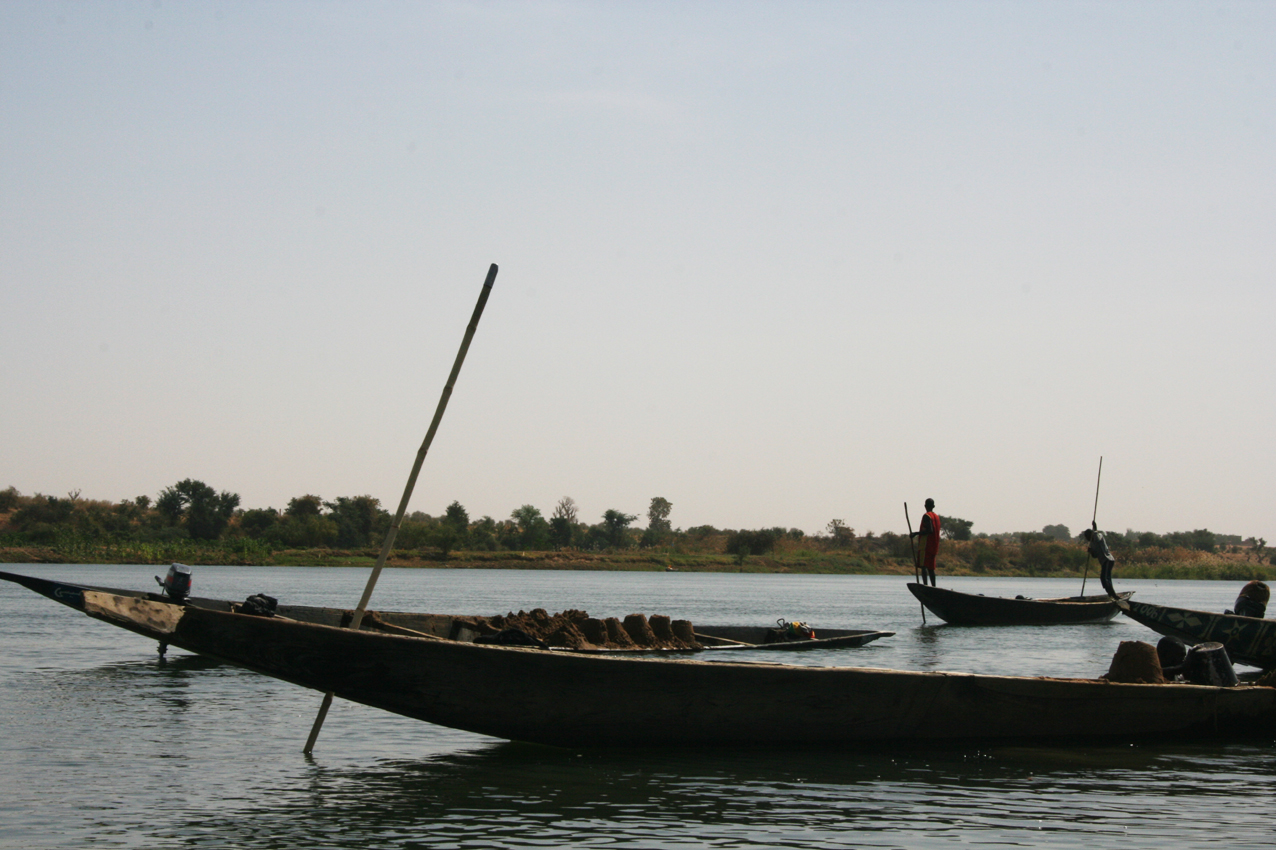 Ramasseurs de sable au fond du fleuve Sénégal à proximité de Kayes ('en remontant vers Médine), région de Kayes, Mali